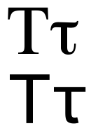 greek letter tau